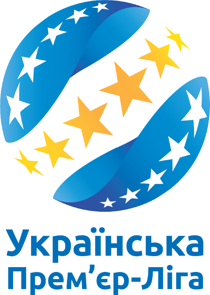 Офіційна емблема Прем'єр-Ліги